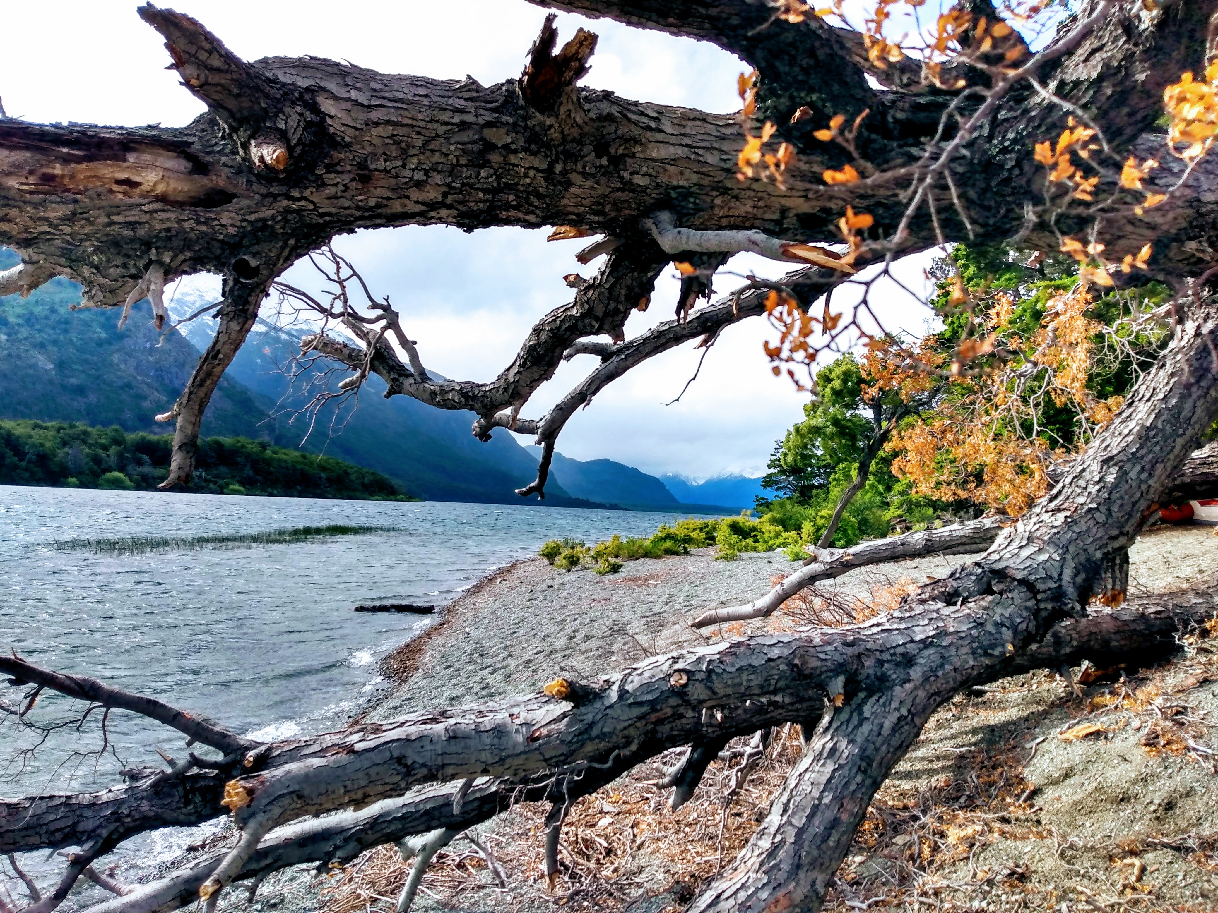 Vista del lago desde la orilla oeste.